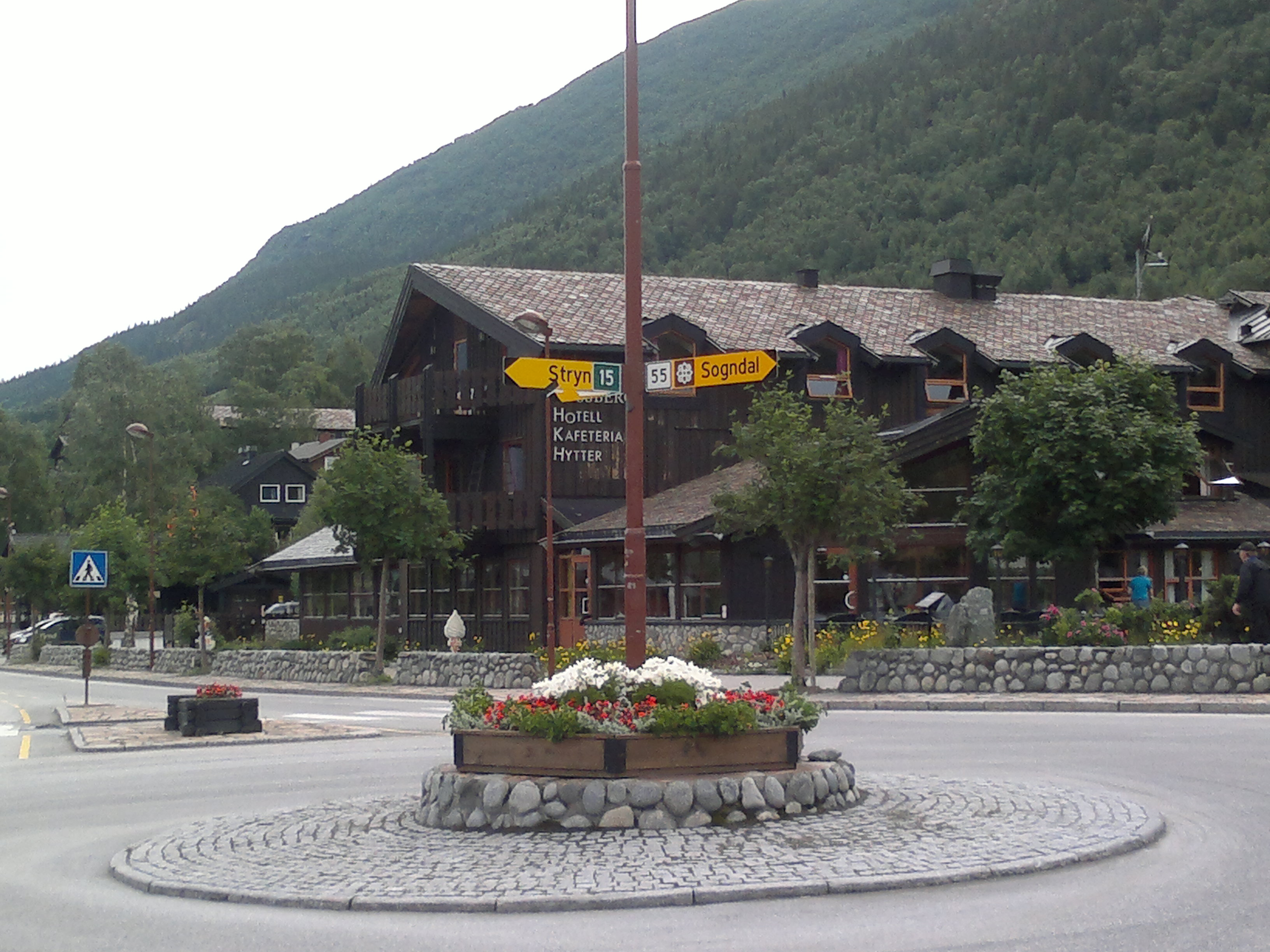 Lomin keskusta Opplandin läänissä, Norjassa.